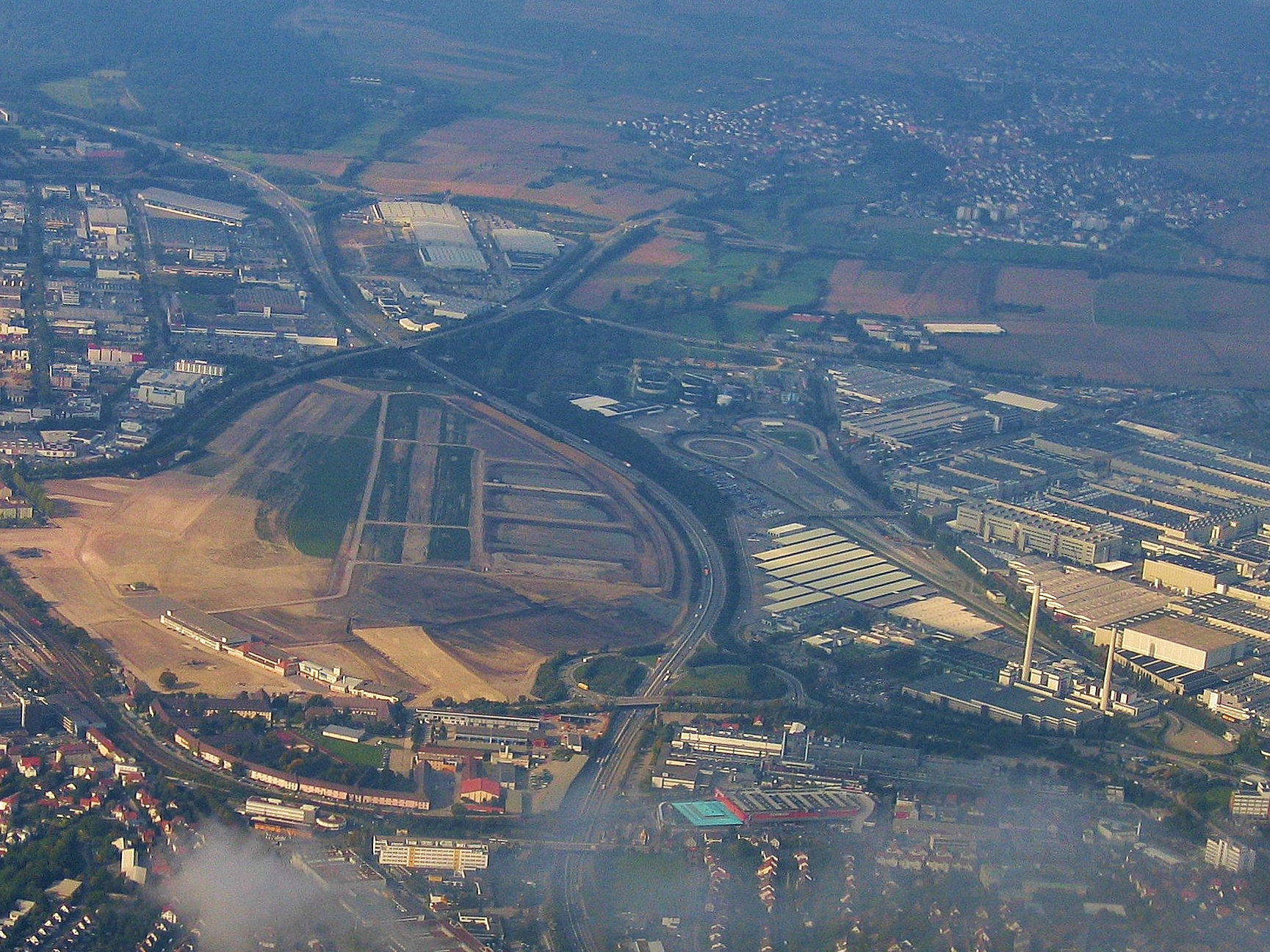 Flugfeld Böblingen/Sindelfingen im Jahr 2005